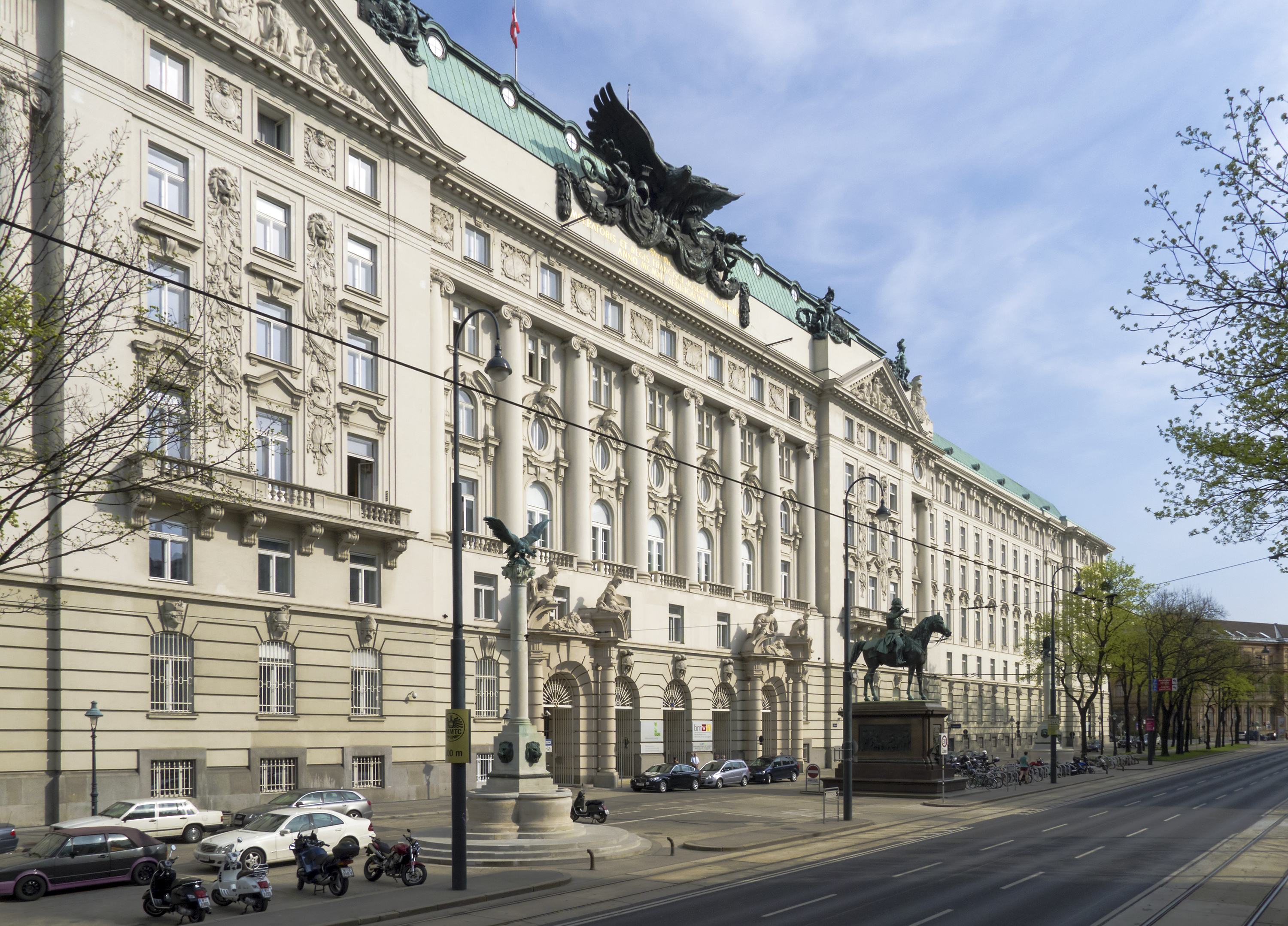 K.u.k Kriegsministerium in Wien 1